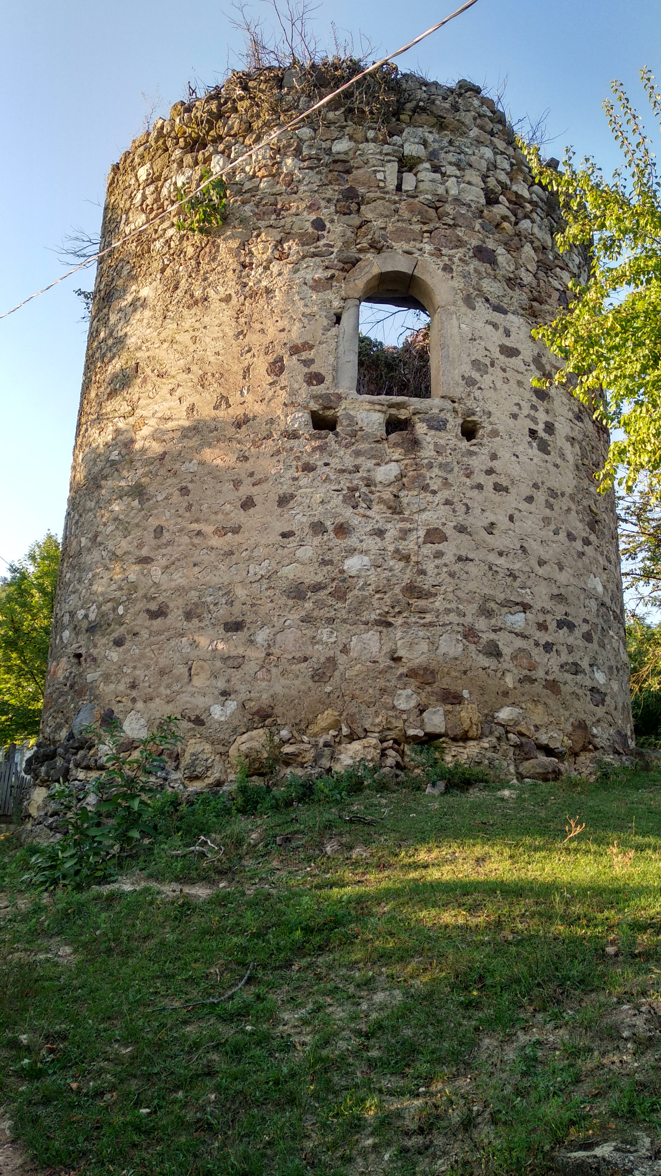 ნებოძირის კოშკის წინა მხარე